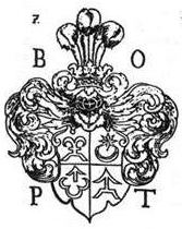 Родавыя гербы XVI i XVII стст. Віленская школа.